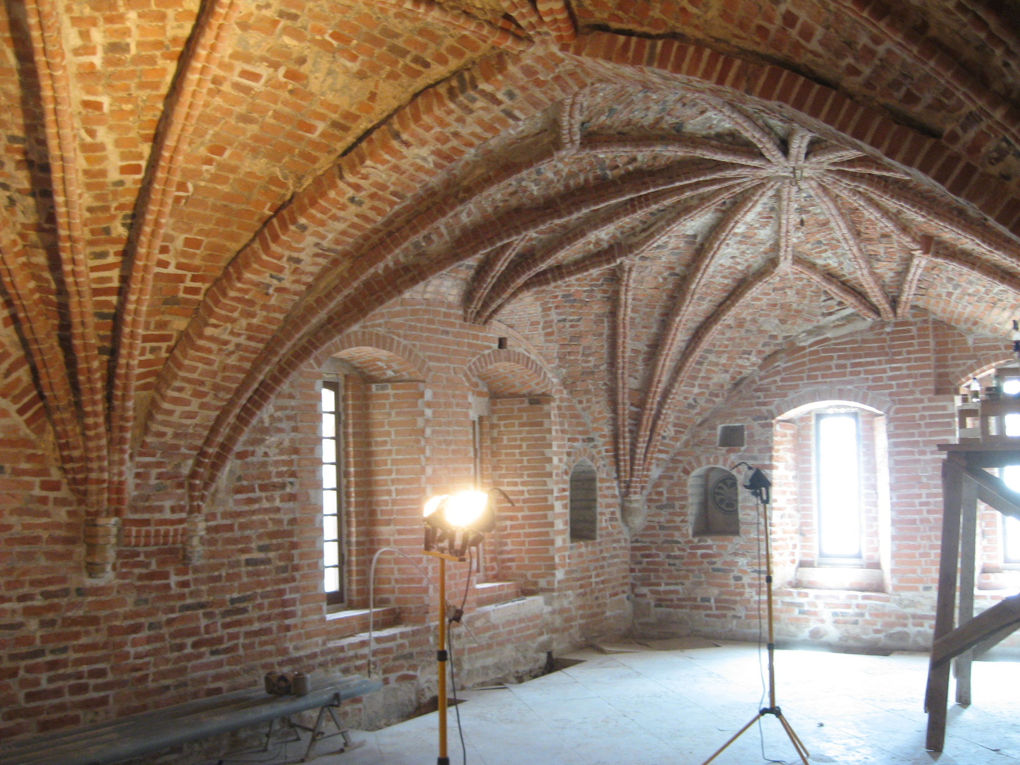 Владычная палата в Новгородском Детинце. Внутренний вид.